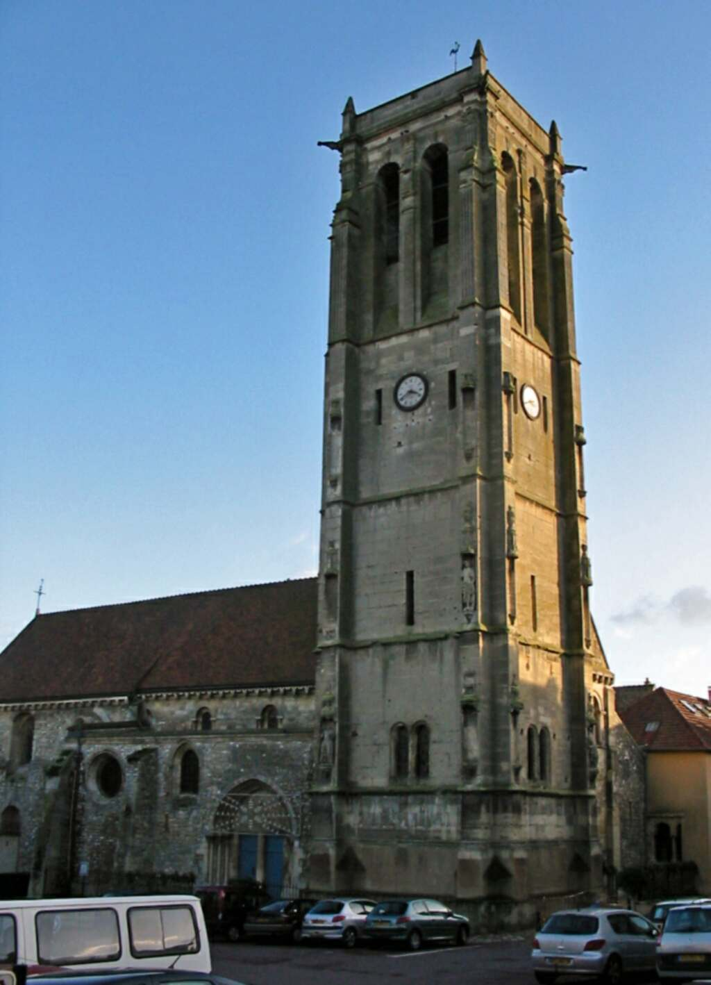 Église de Maule (Yvelines) Photo JH Mora ; janvier 2005 Catégorie:Image d'église des Yvelines Catégorie:Image de Maule